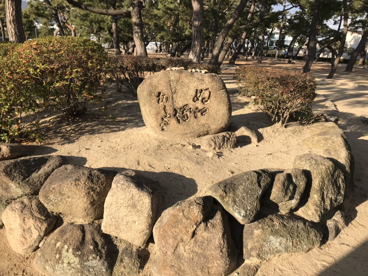 芦屋公園内にあるぬえ塚